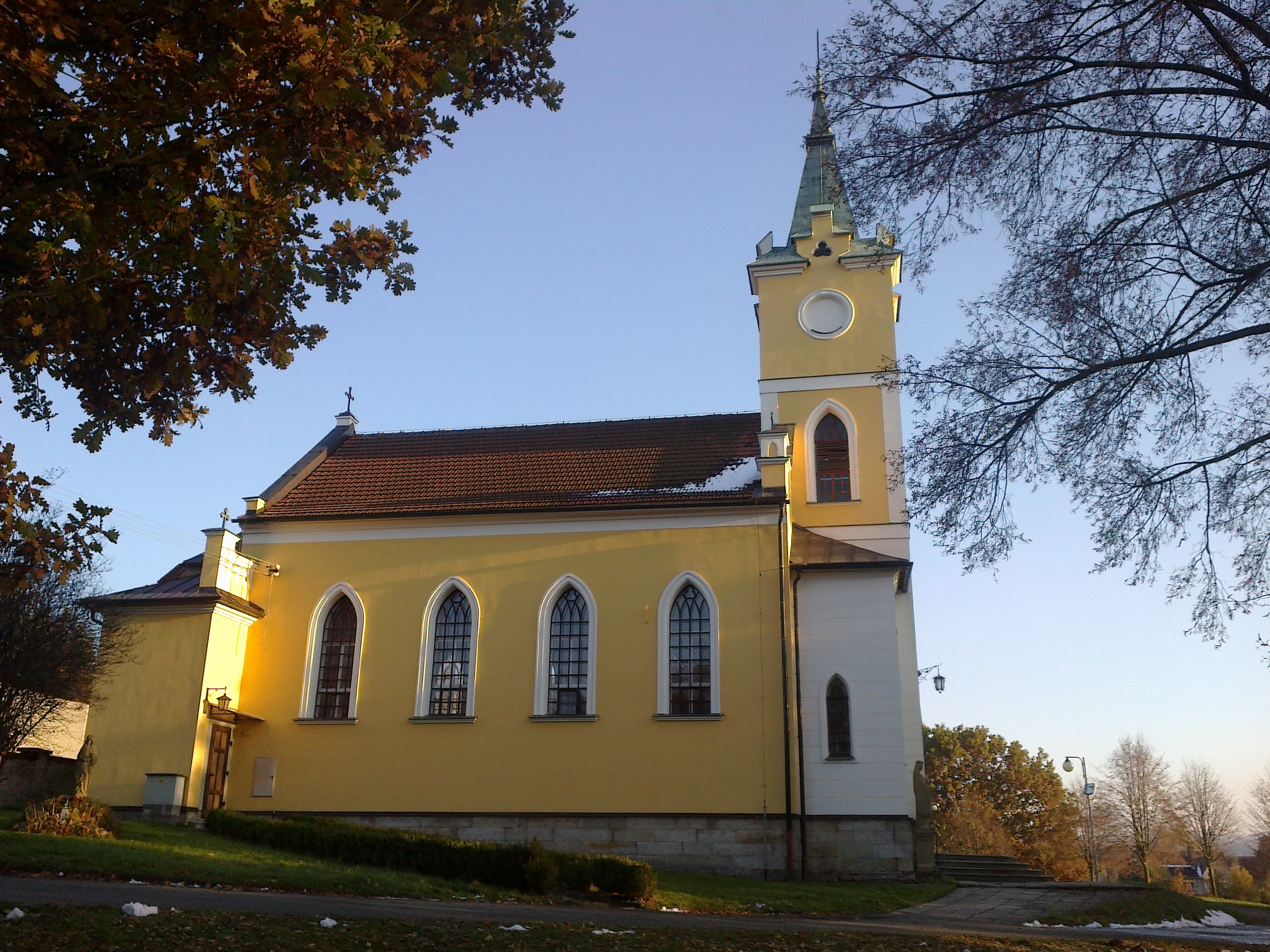 Kostel Velké Poříčí